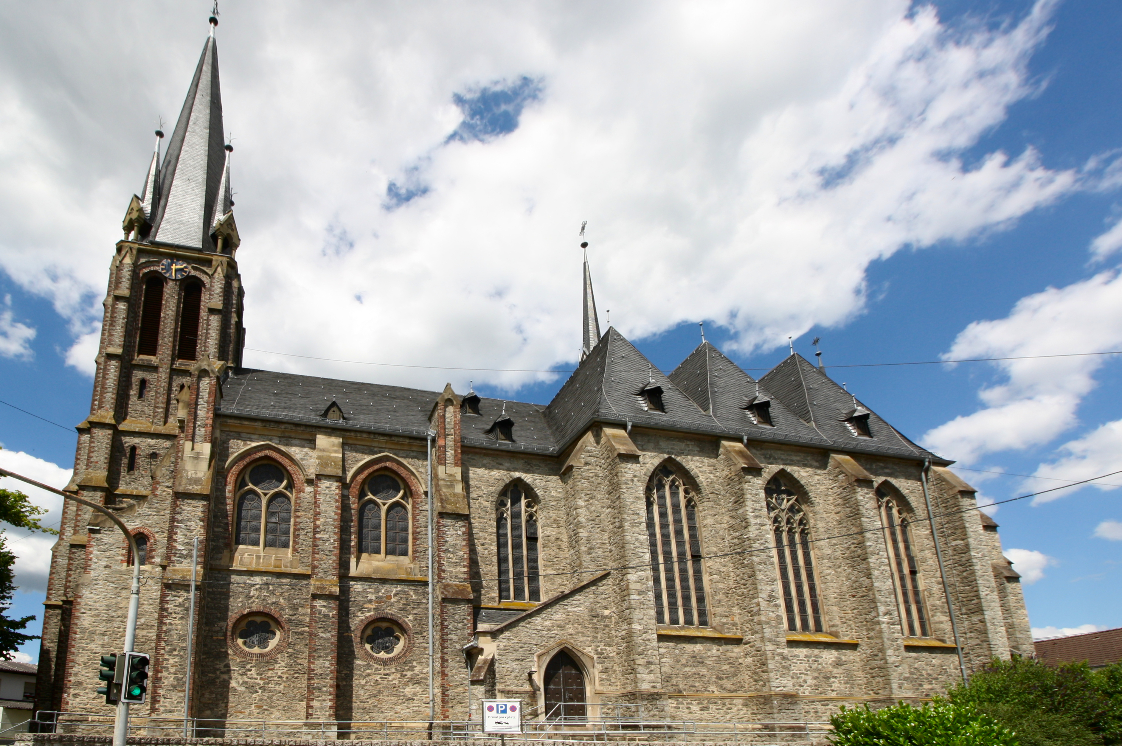 Westerwälder Dom St. Bonifatius, Wirges, Westerwald, Rheinland-Pfalz, Deutschland